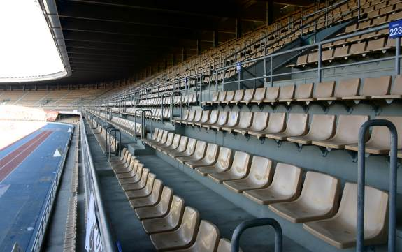 Vista interior del Estadio